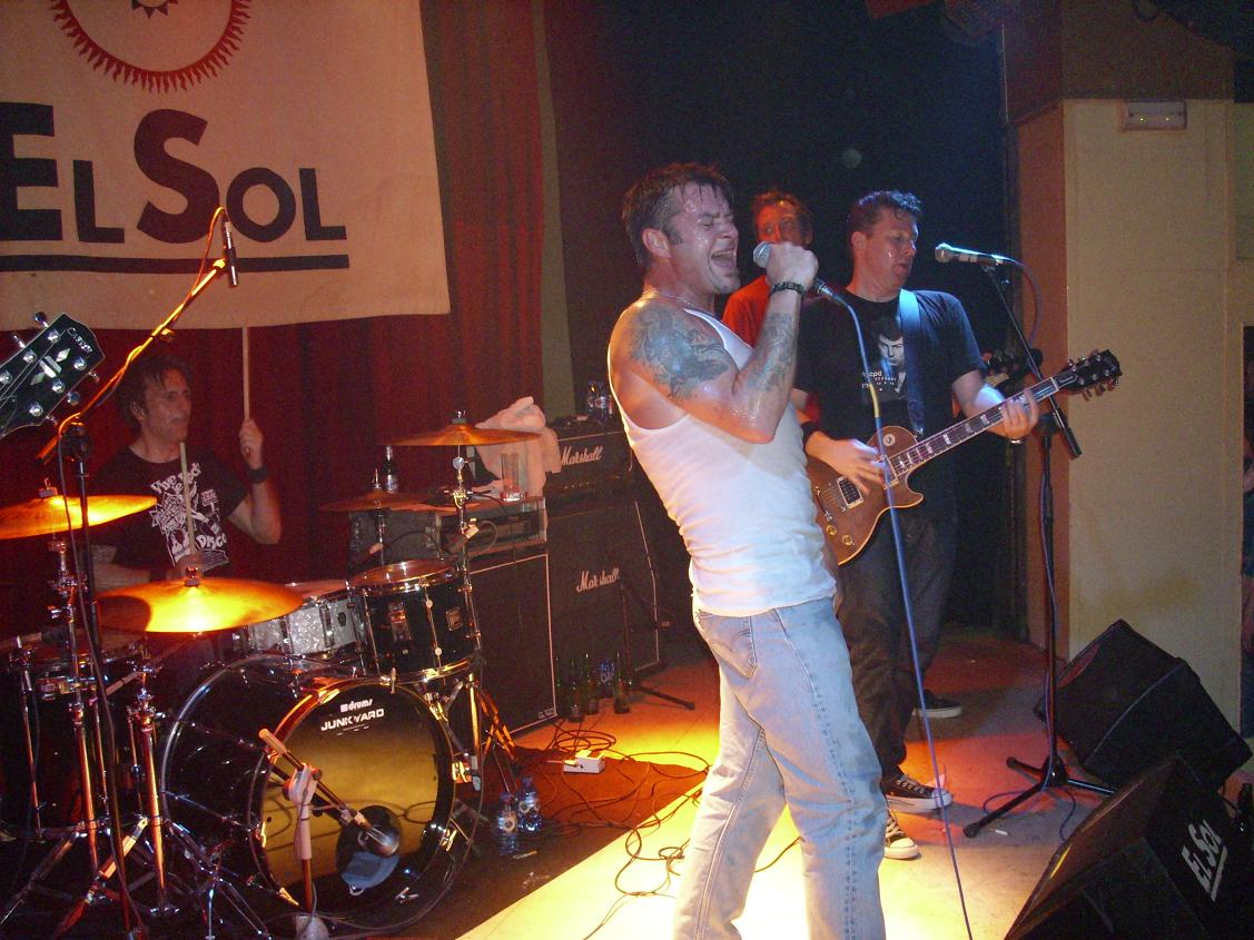 Sala El Sol Madrid , 20 Mayo 2008